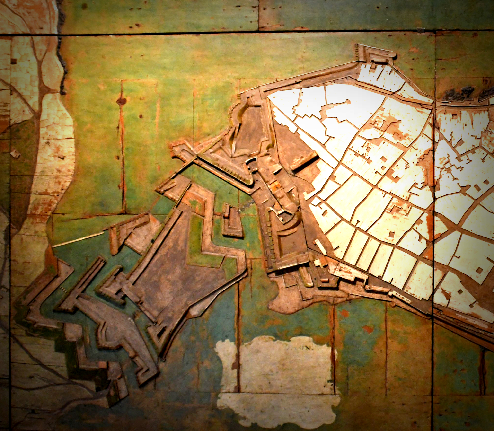 Le fortificazioni spagnole di Siracusa-Ortigia